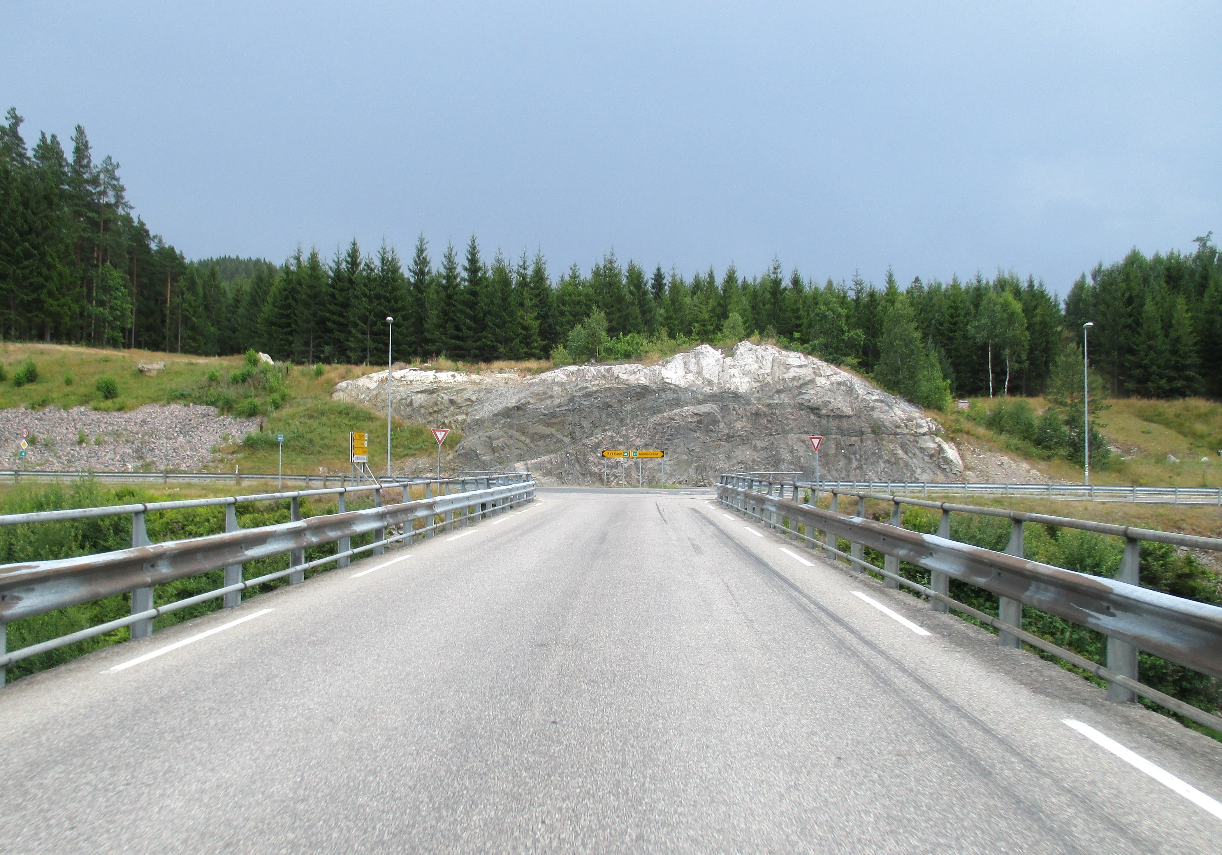 Fylkesvei 252 på Mollestad bru, like ved riksvei 41